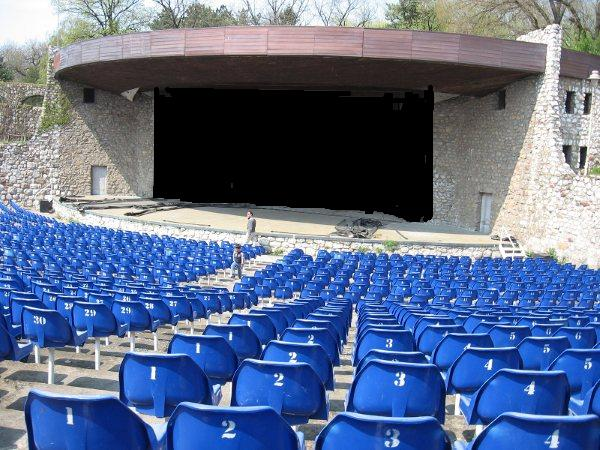 Letnja pozornica u Niškoj tvrđavi